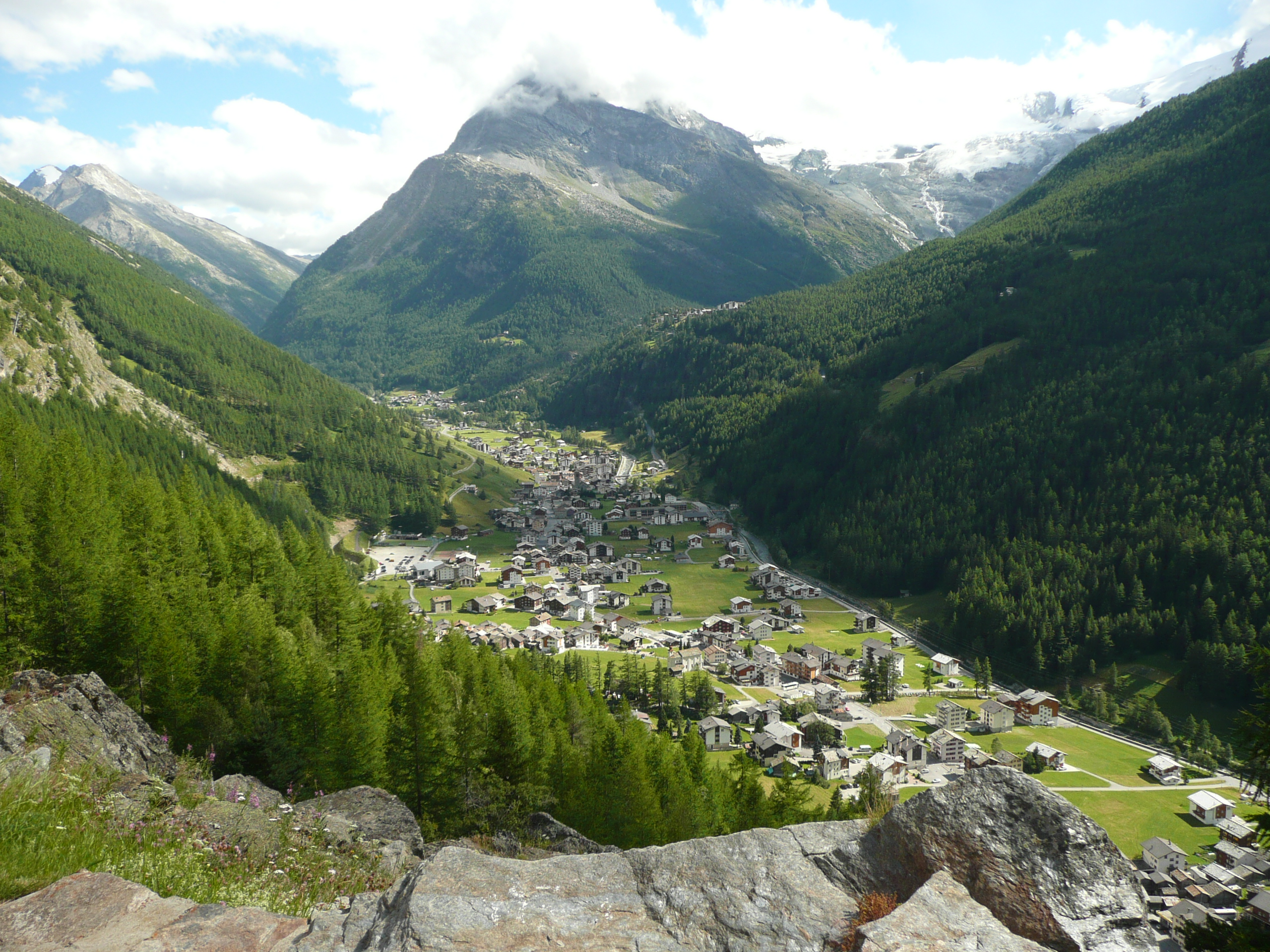 Saas-Grund mit Plattjen.